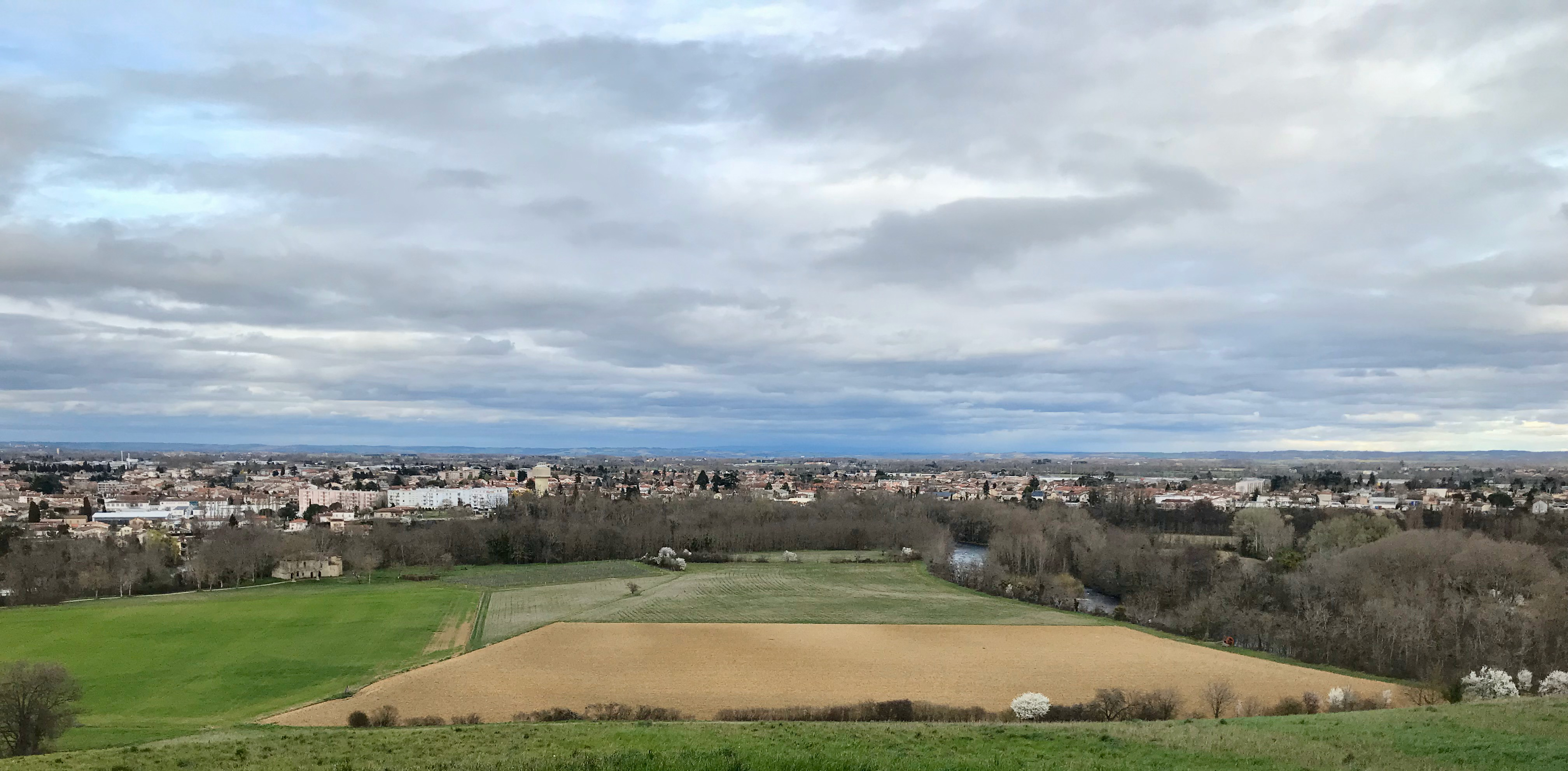 Le site de la ville de Pamiers vu depuis le site de Cailloup sur la rive gauche de l'Ariège